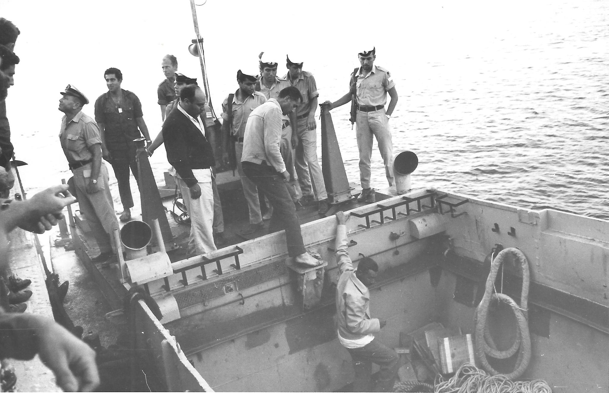 שבויים מצריים שנתפסו על ידי אח"י חיפה מוברדים לבטן נחתת בדרכם לנמל חיפה.